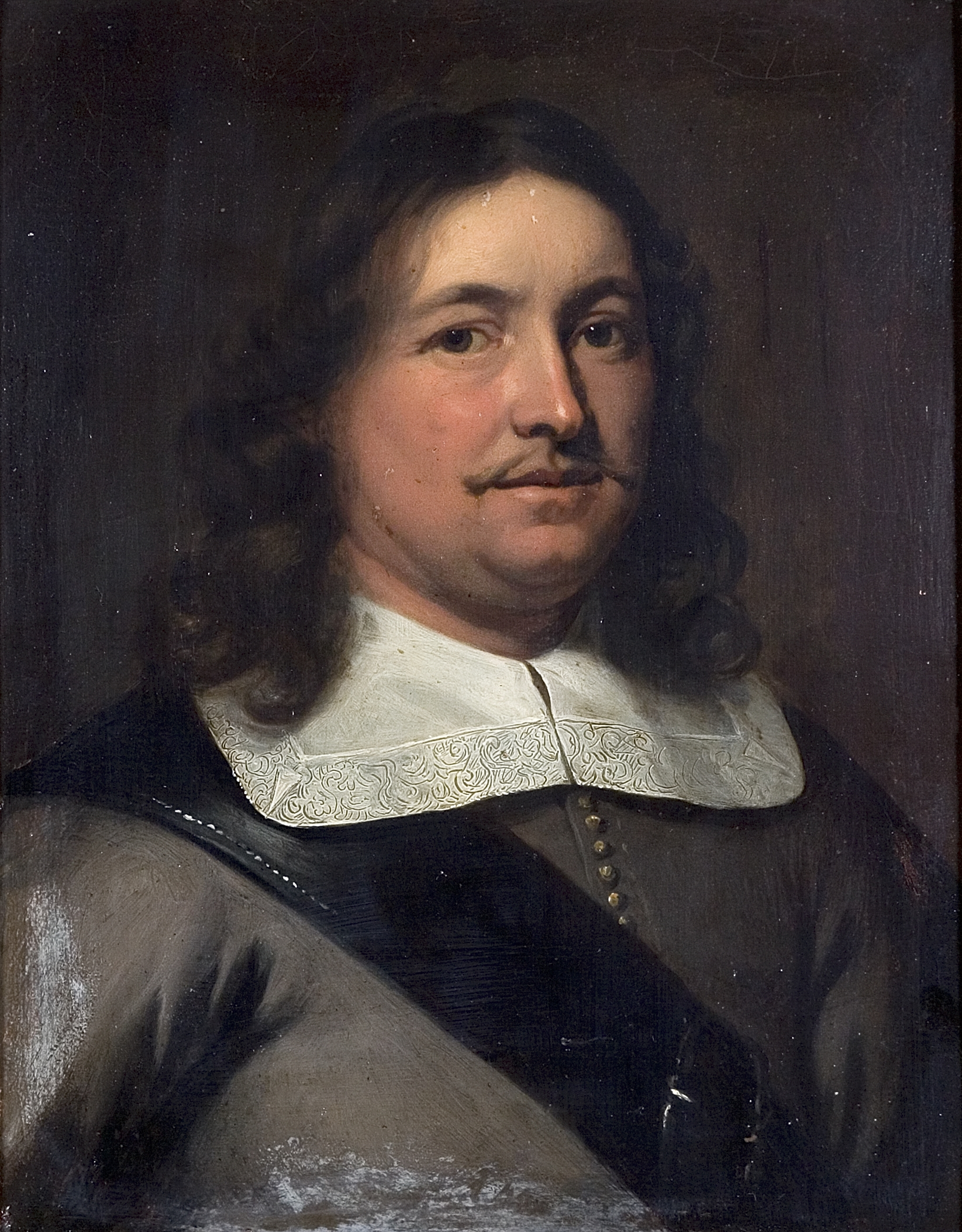 portret